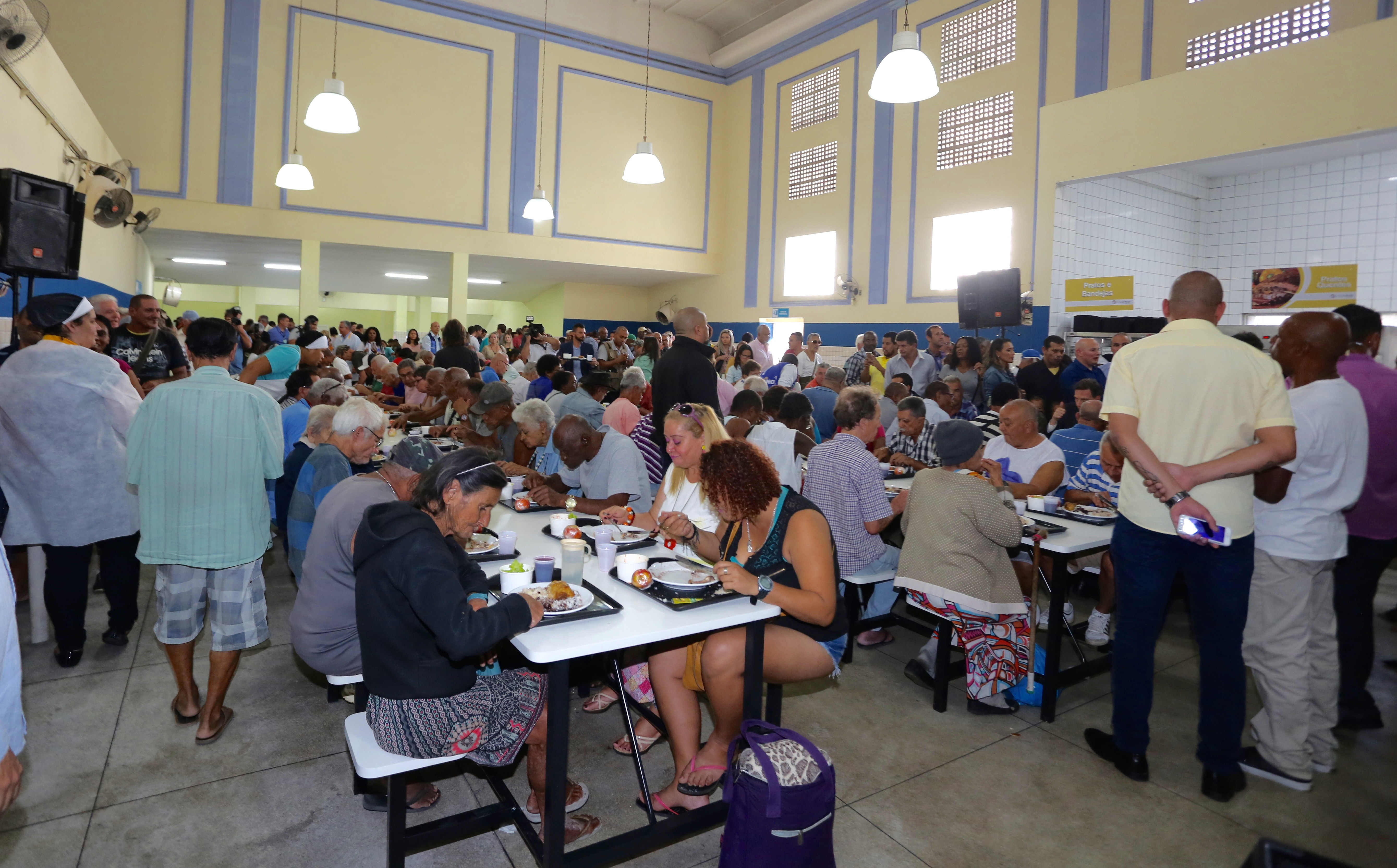 Restaurante Popular de Campo Grande em 17/07/2017, dia em que foi reaberto pelo prefeito Marcelo Crivella e pela secretária Clarissa Garotinho.